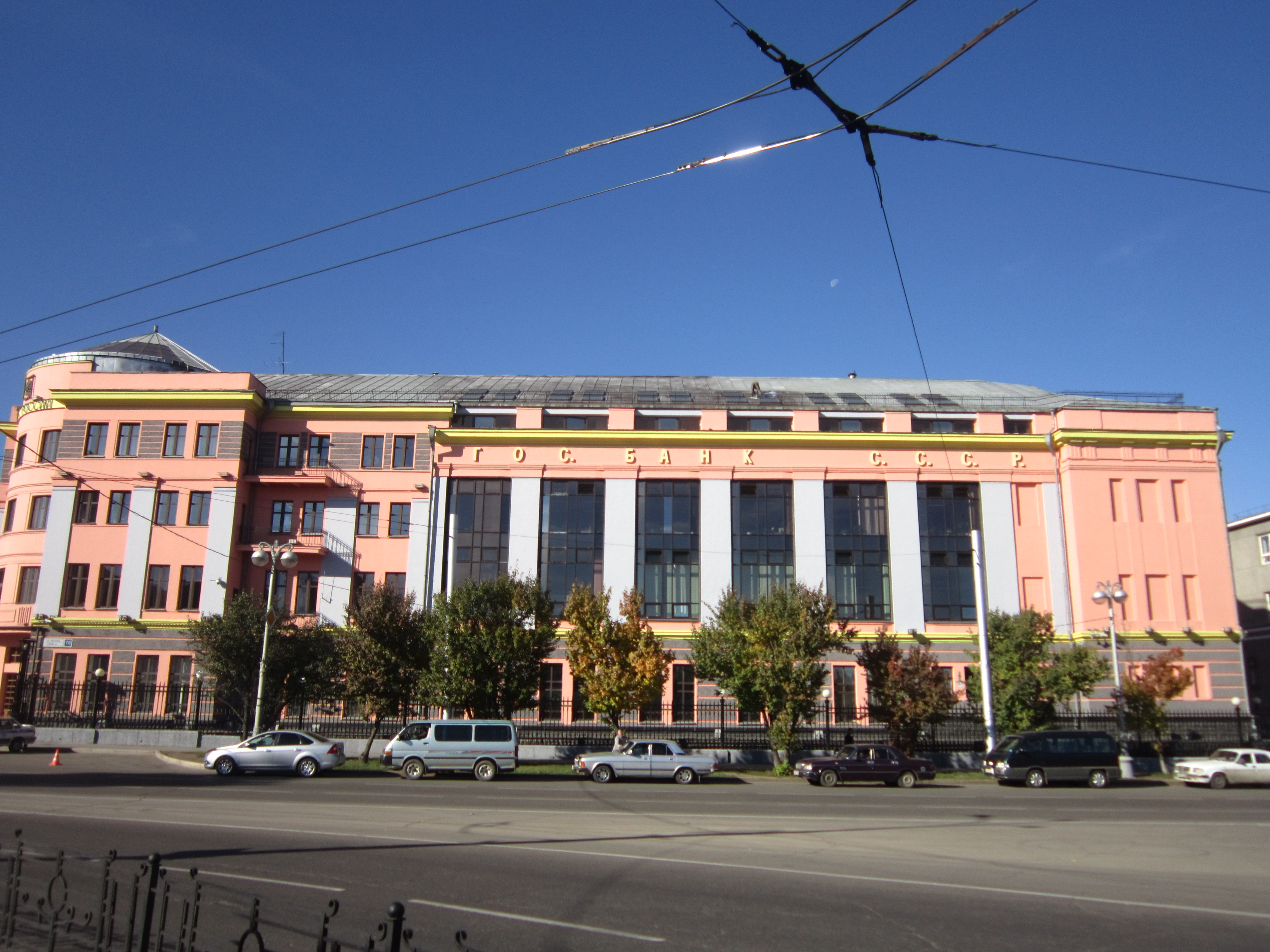 Здание иркутского отделения государственного банка ссср (Иркутская область, Иркутск, улица Ленина, 16)